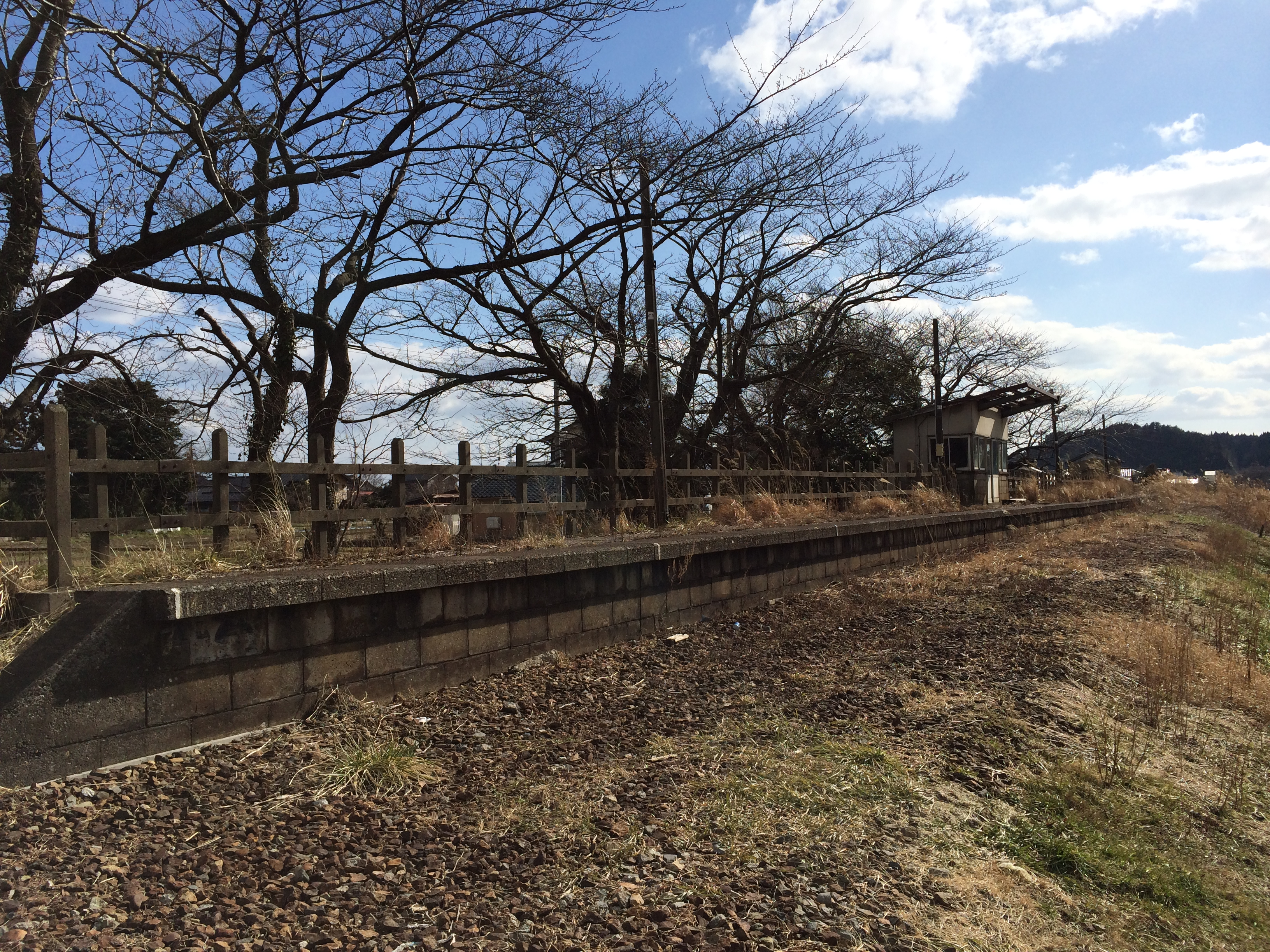 投稿者が撮影